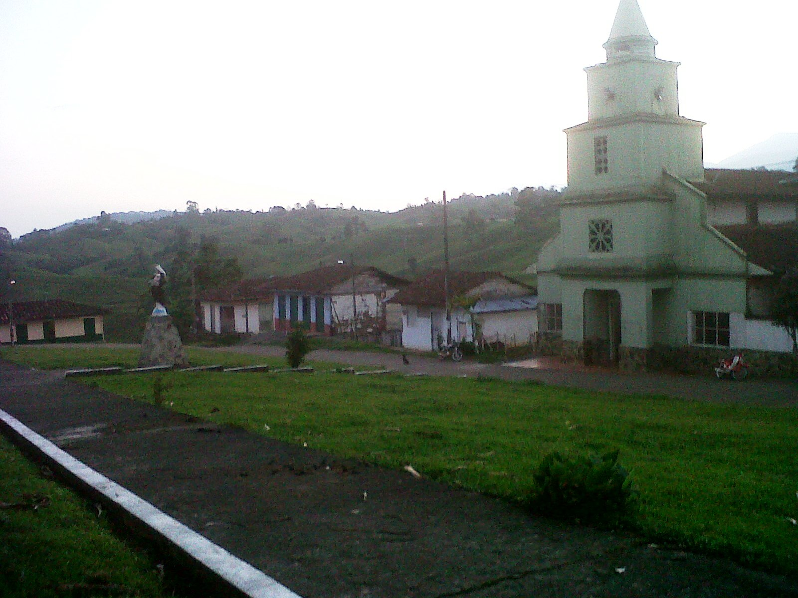 Iglesia principal corregimiento Fenicia-Riofrio-Colombia